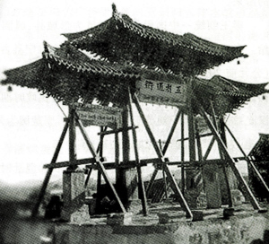 民國時期北伐前徐州黃河故道旁「五省通衢」牌樓